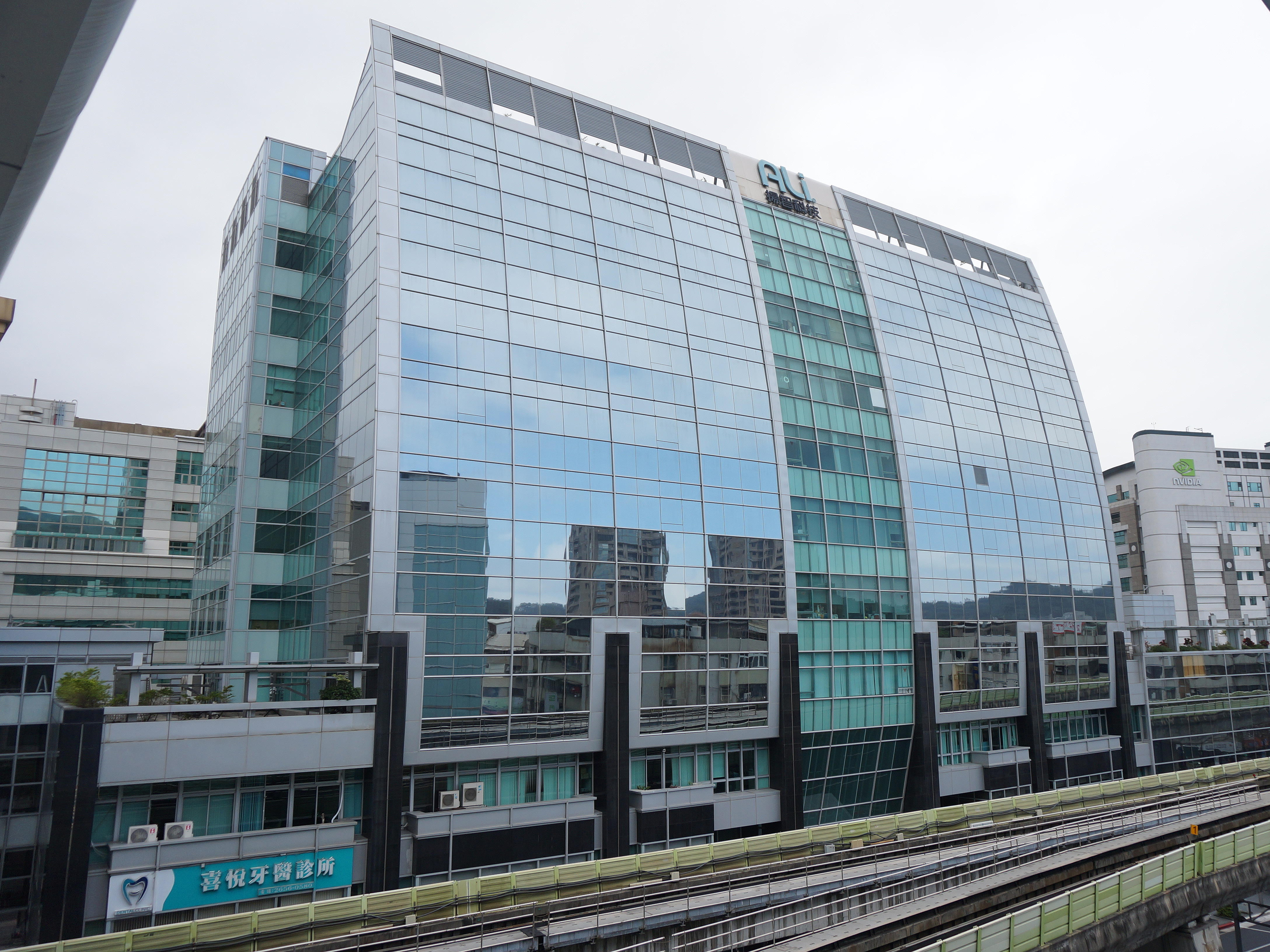 揚智科技總部，地址：臺北市內湖區內湖路一段246號6樓（NASA科技總署）。